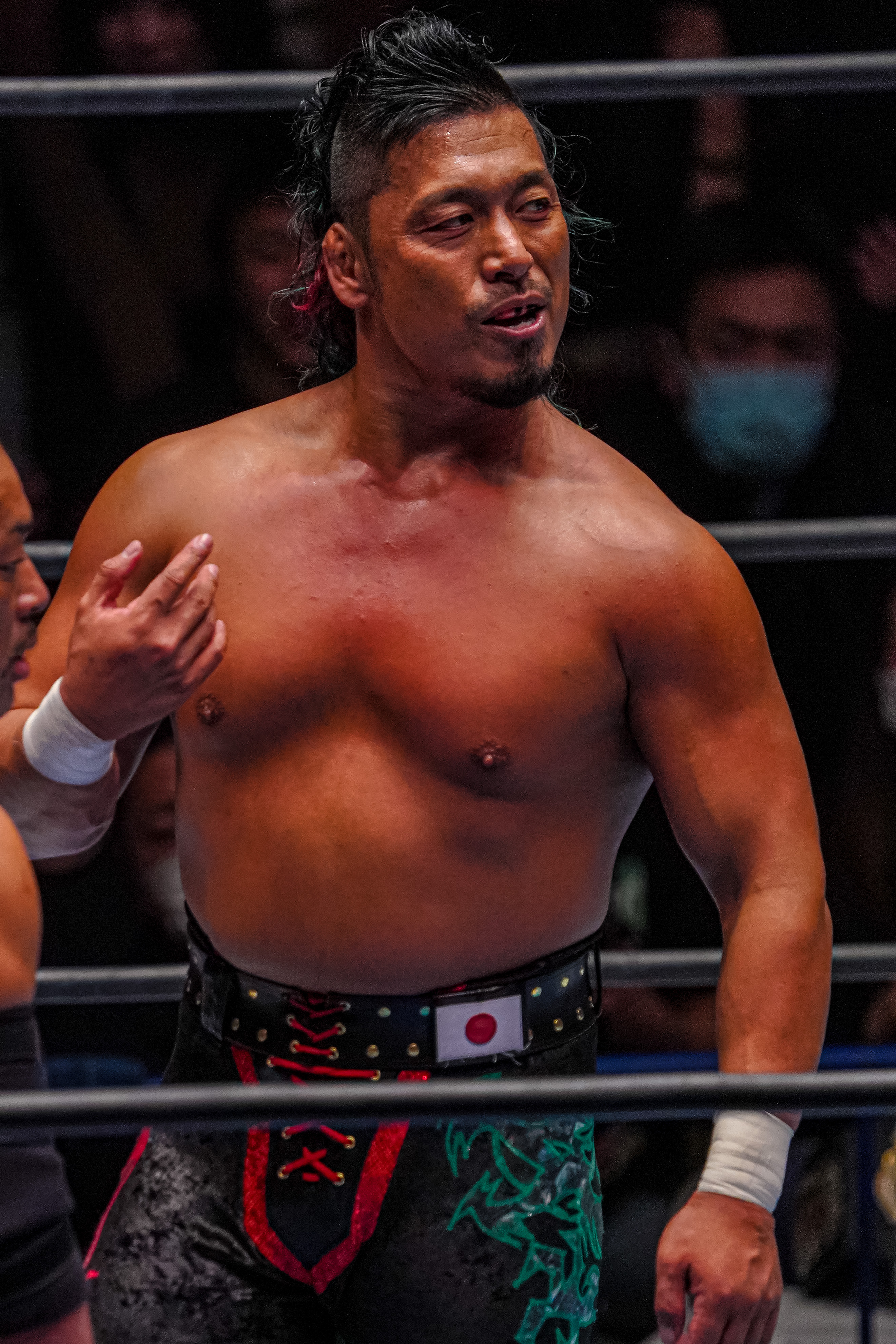 2020.02.20 後楽園ホール